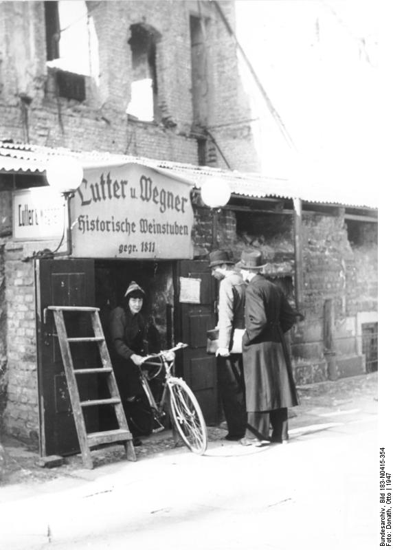 ADN-ZB/Donath Berlin 1947 - Bekannte Lokale Die Historischen Weinstuben Lutter und Wegner in der Französischen Straße, wurden nach der Zerstörung wieder notdürftig geöffnet.